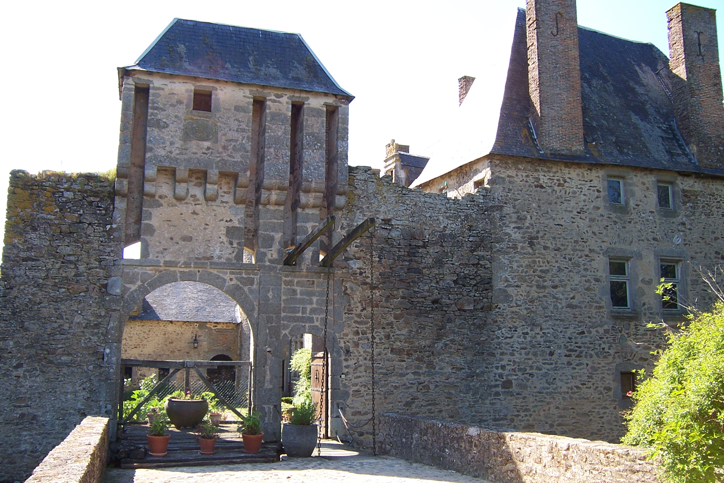 France - Deux-Sèvres - Beaulieu sous Parthenay - Le château